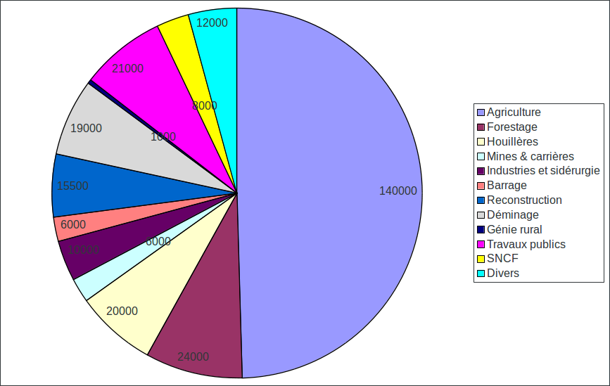 Source : Archives nationales contemporaines de Fontainebleau – Côte 770623/84 – « PG au travail dans l’économie civile au 01/08/1945 »